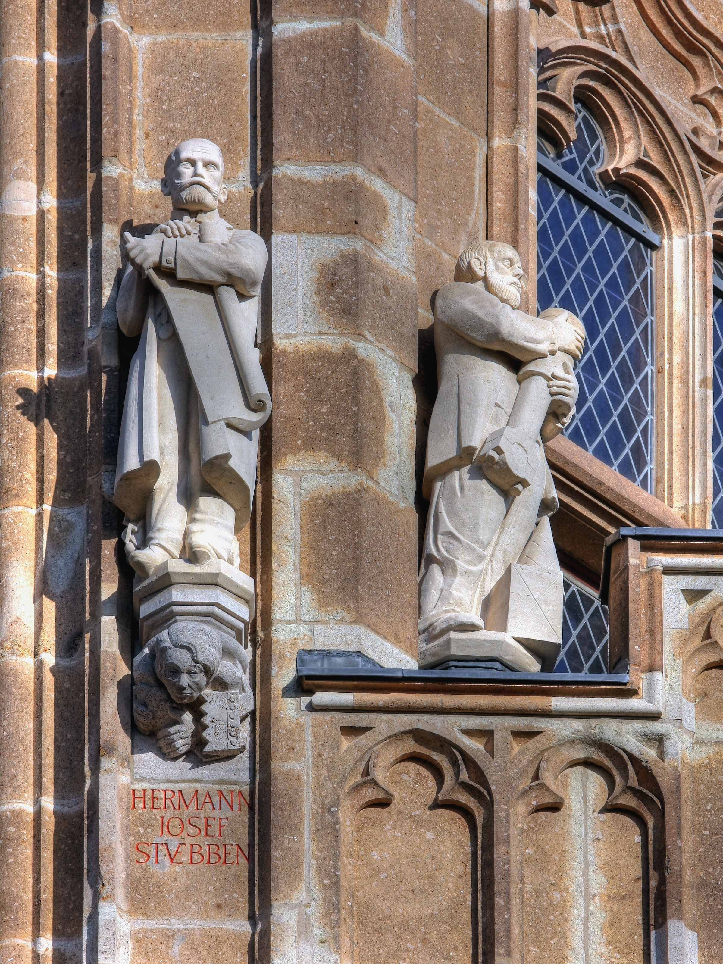 Rathausturm Köln mit der Figur des Hermann Josef Stuebben Details zu der Statue: Bildhauer der Stuebben-Statue: Karl Matthäus Winter Details zu der Konsole: Thema der Konsole unter der Stuebben-Statue: „Dr. Hanna Adenauer“. Bildhauer: Gerd Haas Statue, rechts im Hintergrund: Carl Eugen Lange Bildhauer der Lange-Statue: Theo Heiermann